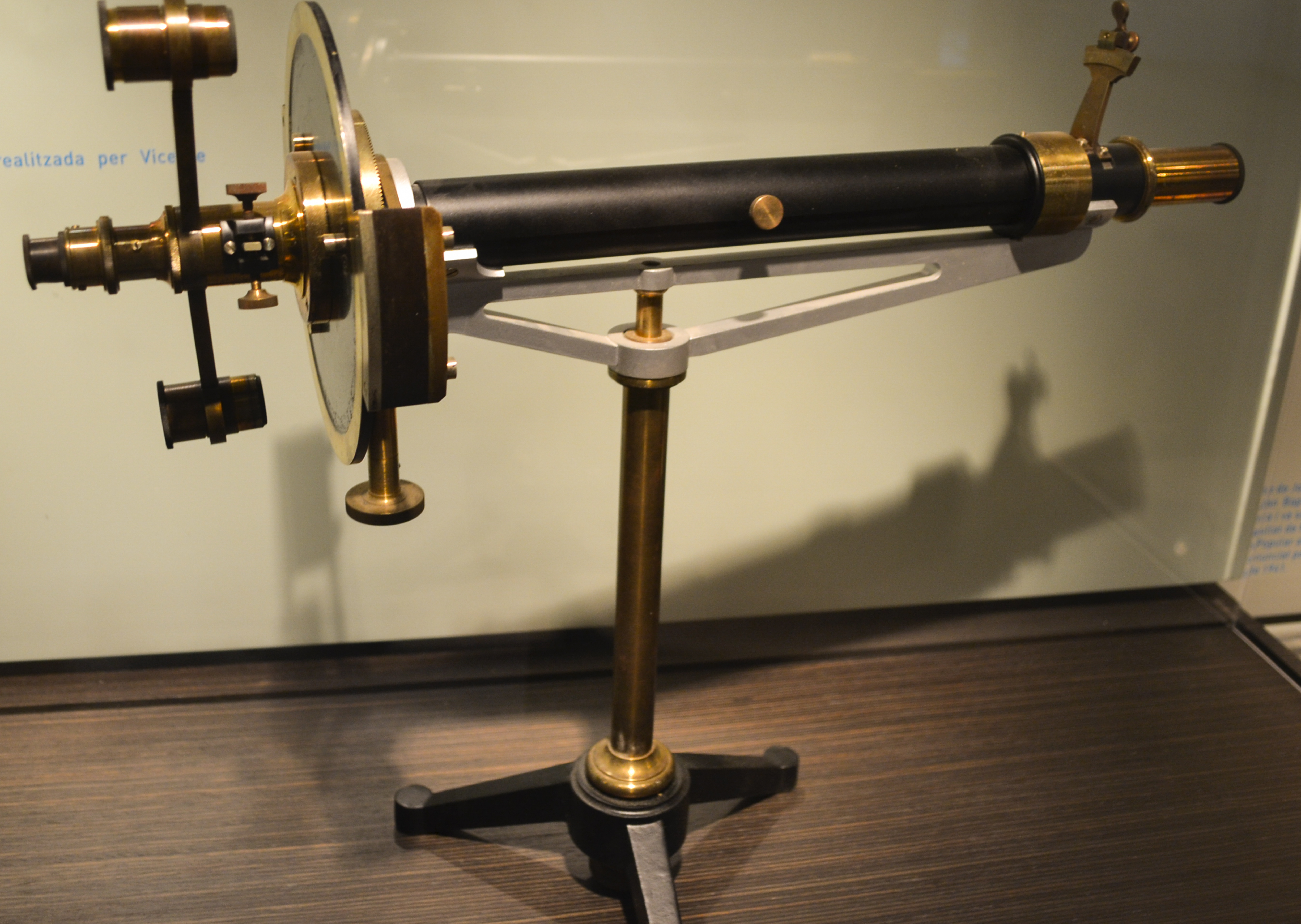 Polarímetre, col·lecció cientificomèdica de la Universitat de València, palau de Cerveró. Schmidt & Haensch, Berlín, c. 1900-1920.